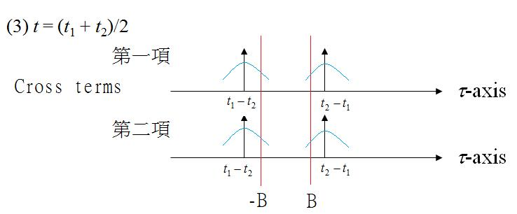 Windowed Wigner Distribution Function with msak function non ideal